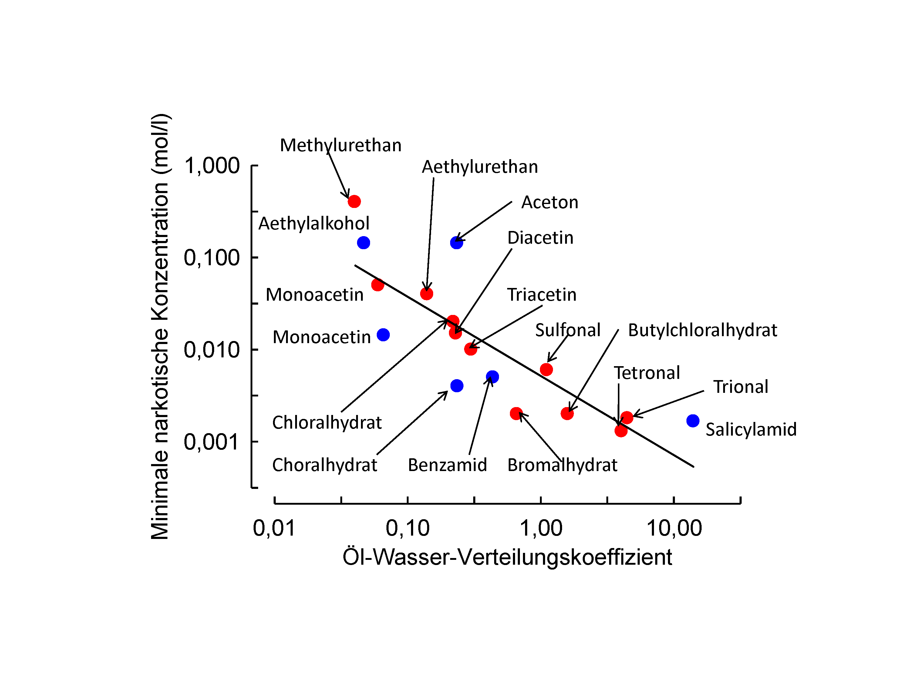 Meyer-Overton-Korrelation; Korrelationsdaten aus Baum 1899 und Meyer 1901